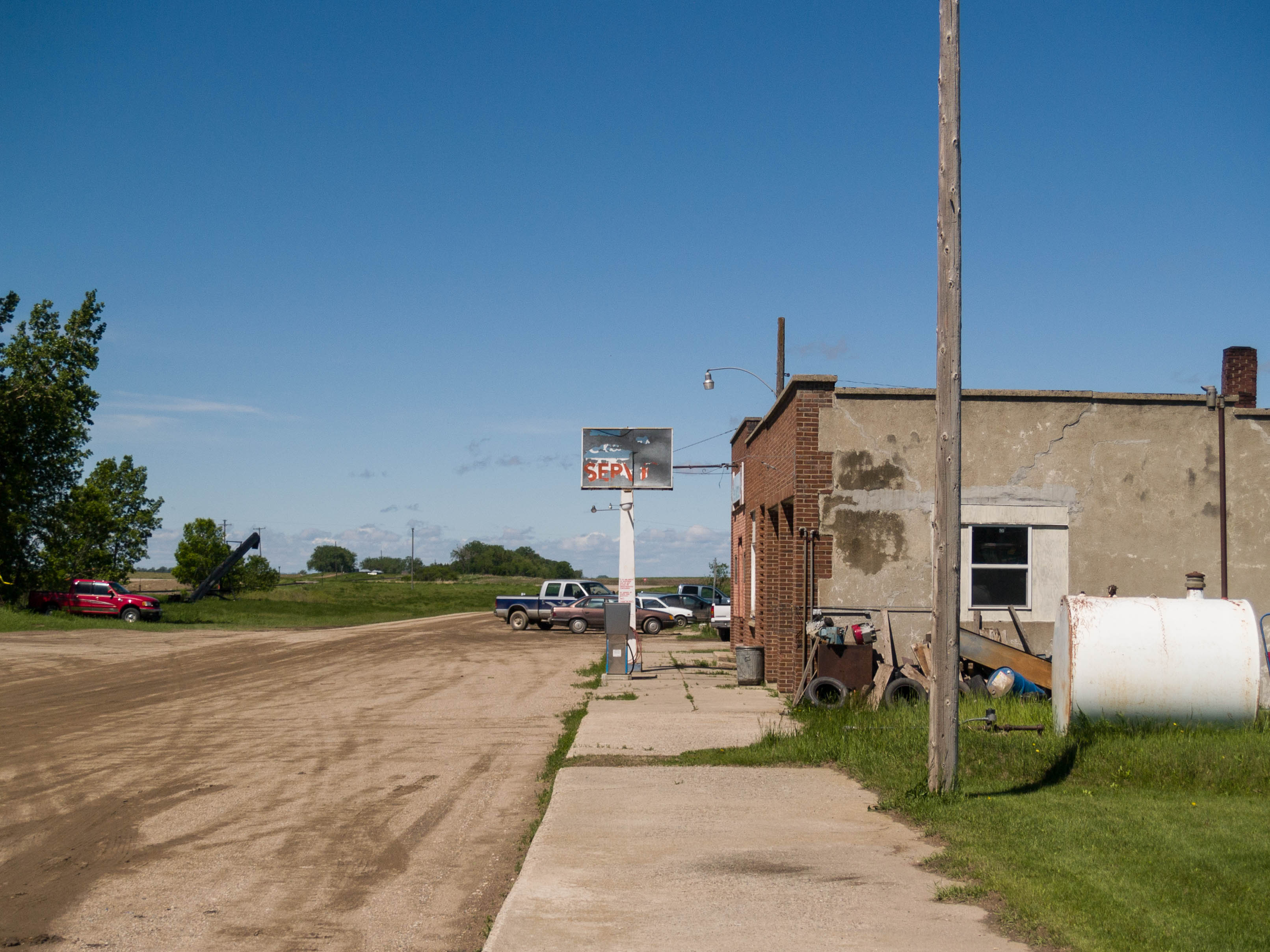 Berlin, North Dakota